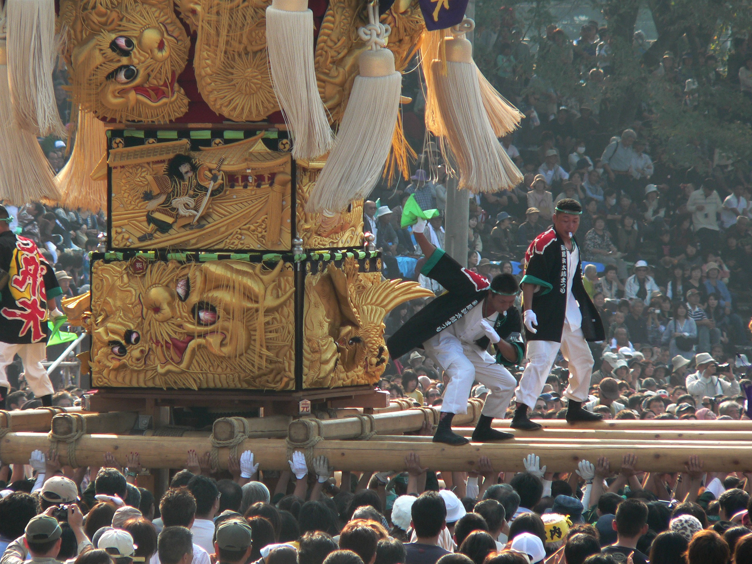 山根グラウンド（2009年新居浜太鼓祭り）